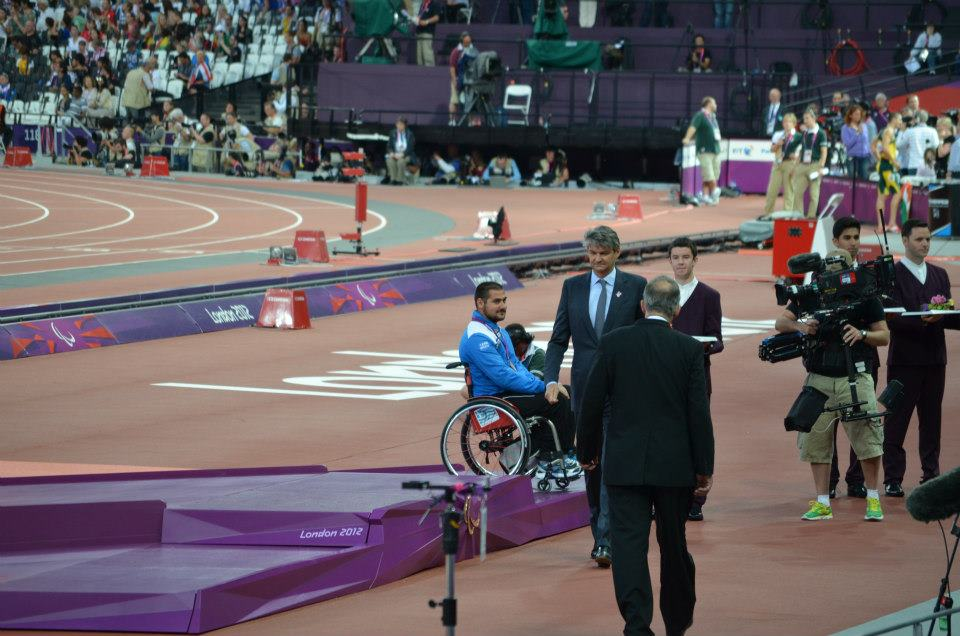 Παραολυμπιακοί Λονδίνο 2012